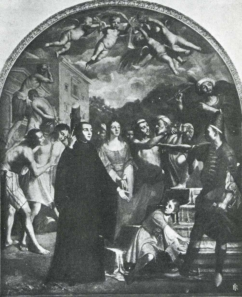 Domenico Marolì, Condanna di San Placido e famiglia. Dalla chiesa di San Paolo a Messina, ora nel Museo Regionale di Messina.